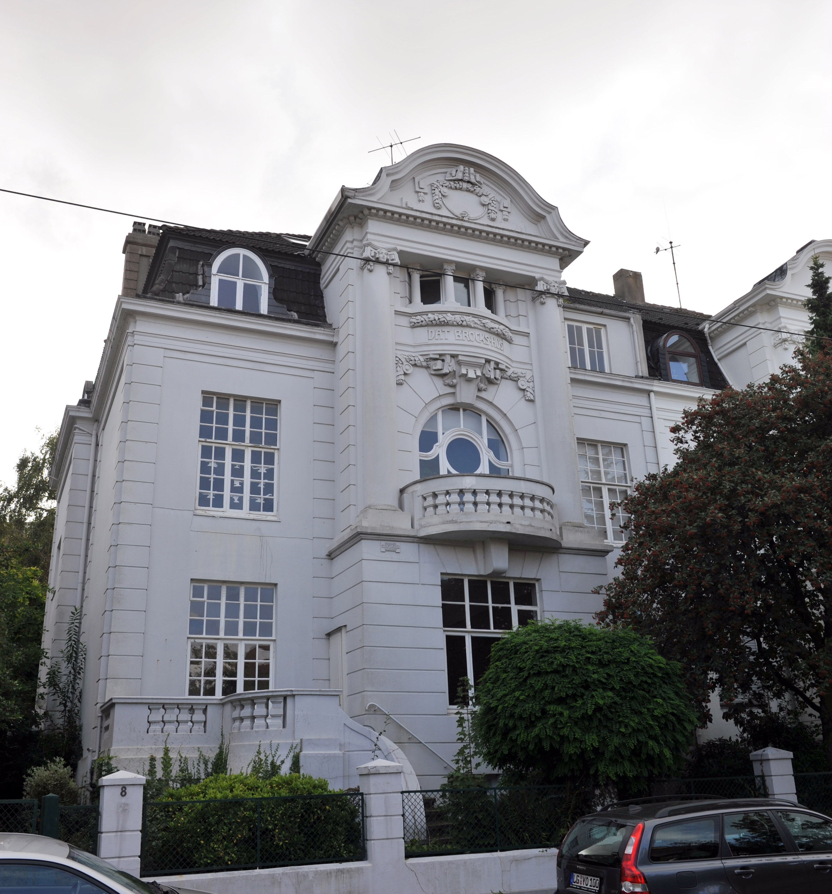 Historical building in Bremerhaven, northern Germany Gildemeisterstraße 8, Wohnhaus, 1903-1904 von Heinrich Stoffregen Das abgebildete Objekt ist ein geschütztes Kulturdenkmal in der Freien Hansestadt Bremen, mit der Nr. 1540 beim Landesamt für Denkmalpflege registriert.